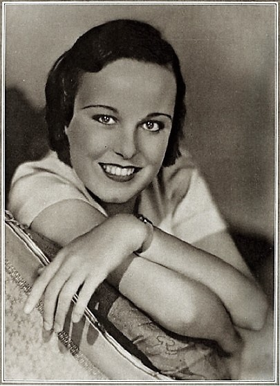 Barbara Weeks